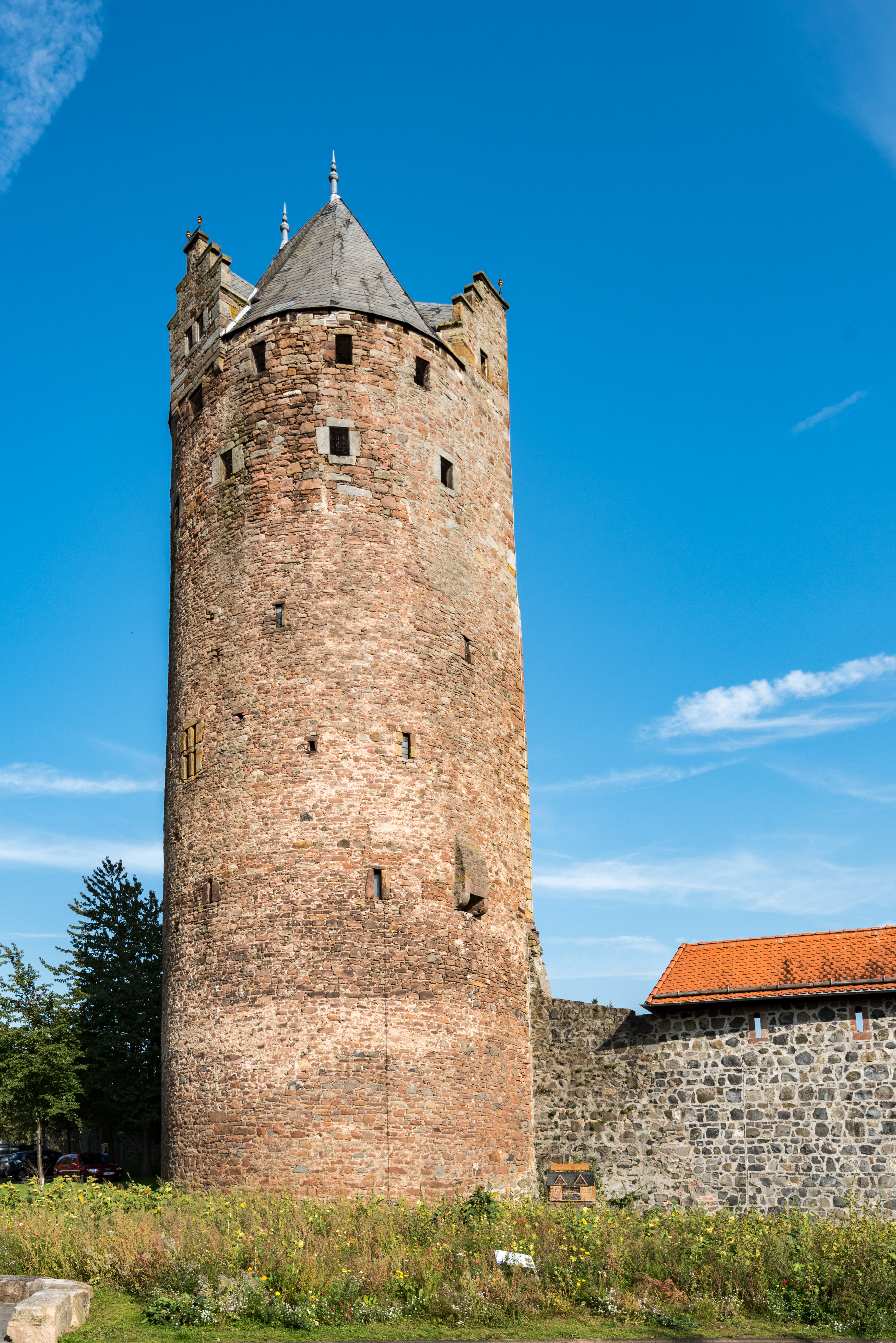 Fritzlar, Stadtbefestigung, Grauer Turm